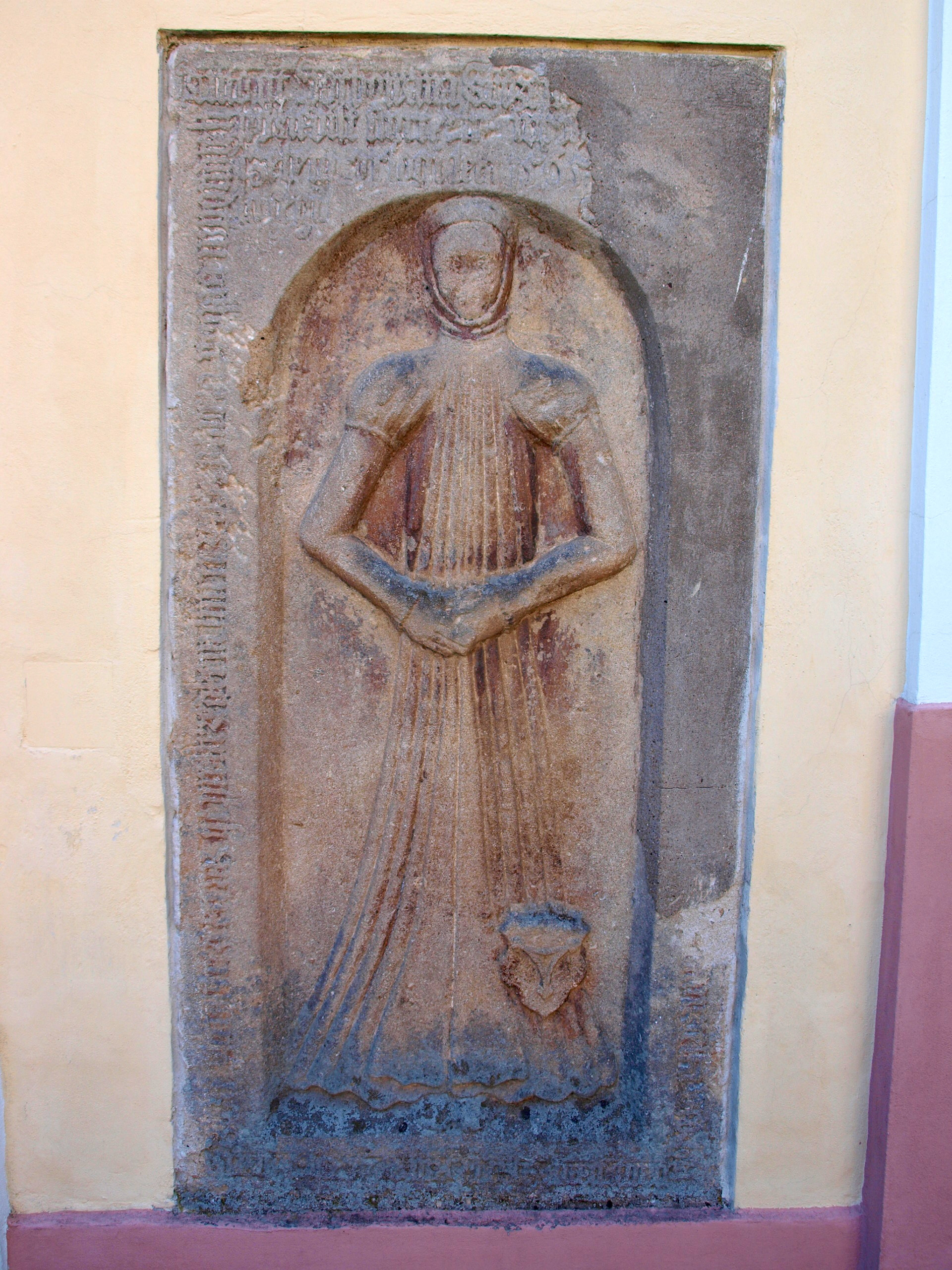 Divišov